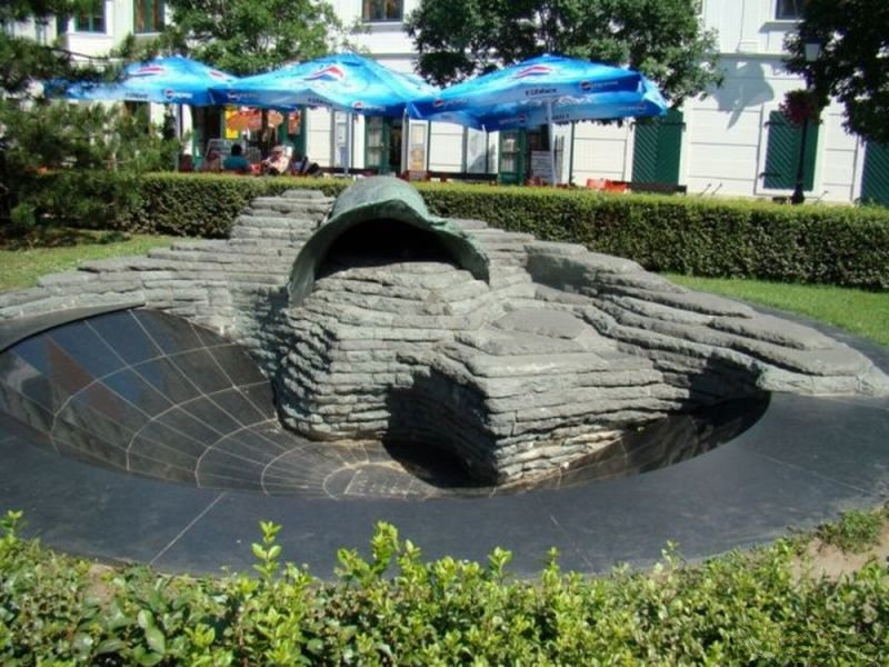 Lugossy Mária szobrász 1995-ben felállított Harang című szobra Székesfehérváron. [1]